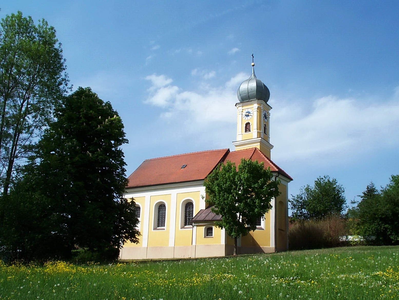 Eschlbach 43. Kath. Filialkirche St. Leonhard; 1716 errichteter barocker Neubau; mit Ausstattung.